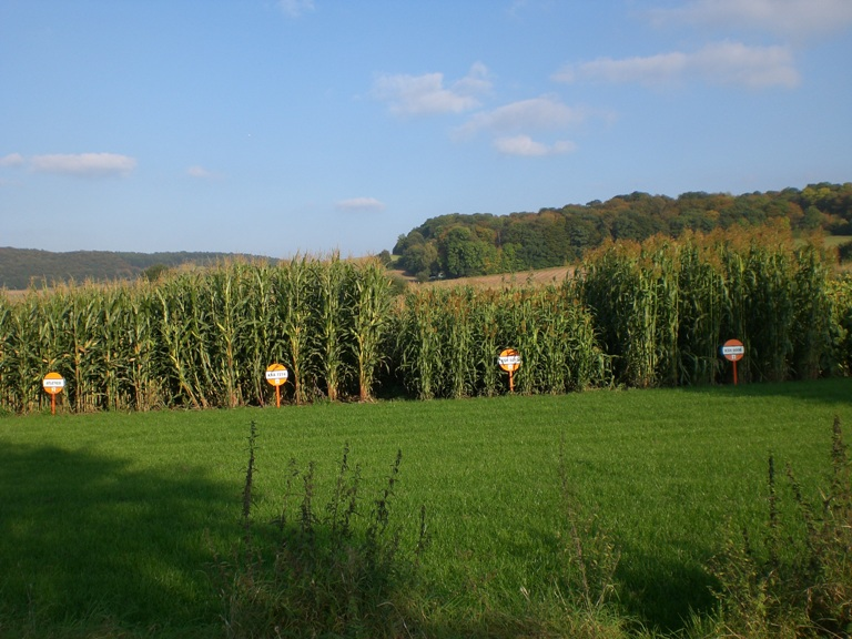 Maiszüchtung (KWS SAAT AG Einbeck), Feldversuch